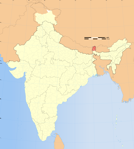 Sikkim Dili'nin konuşulduğu Hindistan'daki Sikkim eyaleti